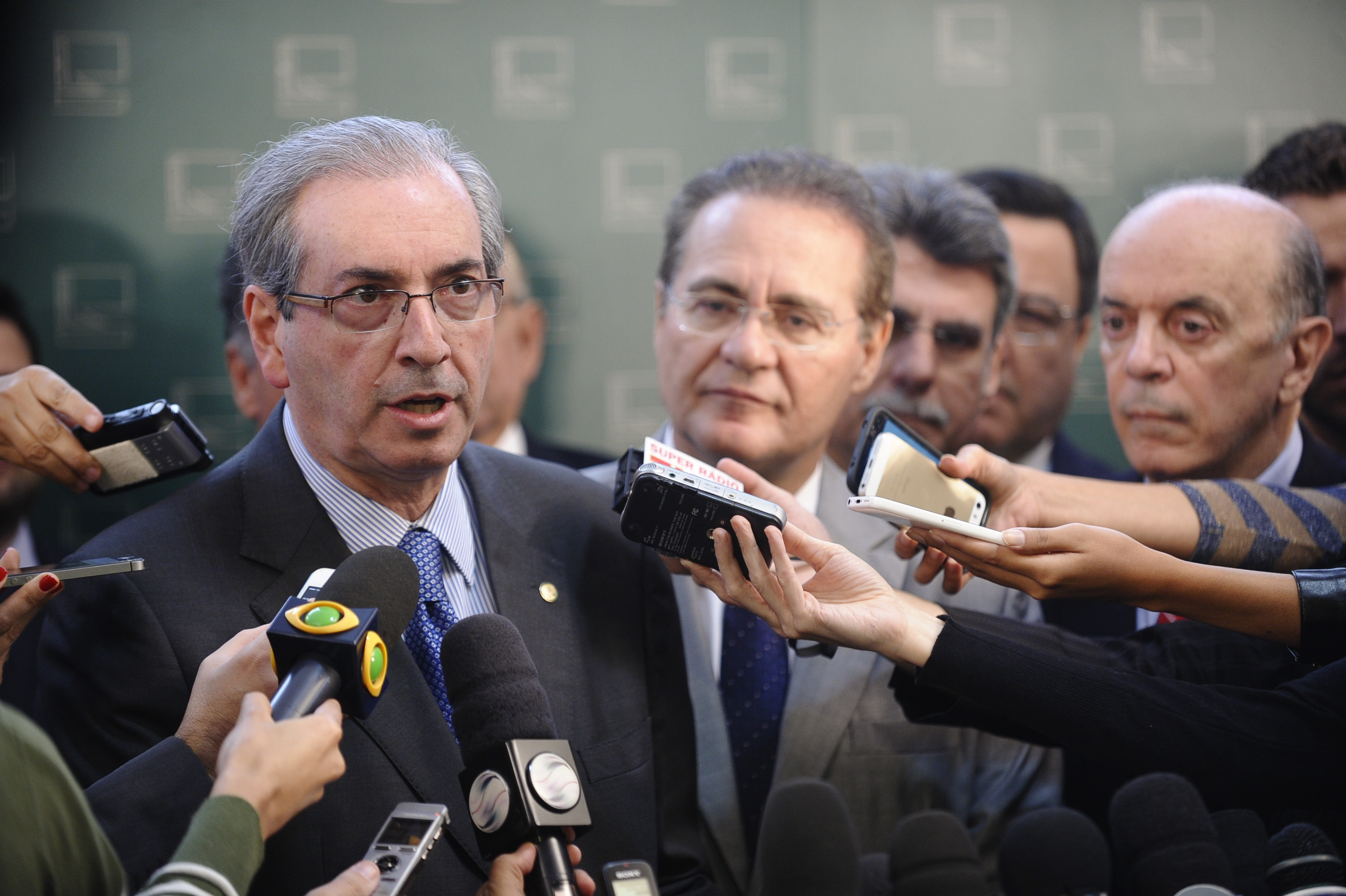 Presidente do Senado Federal, senador Renan Calheiros (PMDB-AL) e o presidente da Câmara dos Deputados, Eduardo Cunha (PMDB-RJ) concedem entrevista após reunião sobre pauta federativa. presidente da Câmara dos Deputados, Eduardo Cunha (PMDB-RJ) concede entrevista. Foto: Marcos Oliveira/Agência Senado